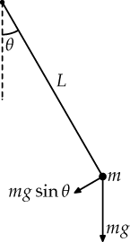 Simple pendulum (labeled diagram).